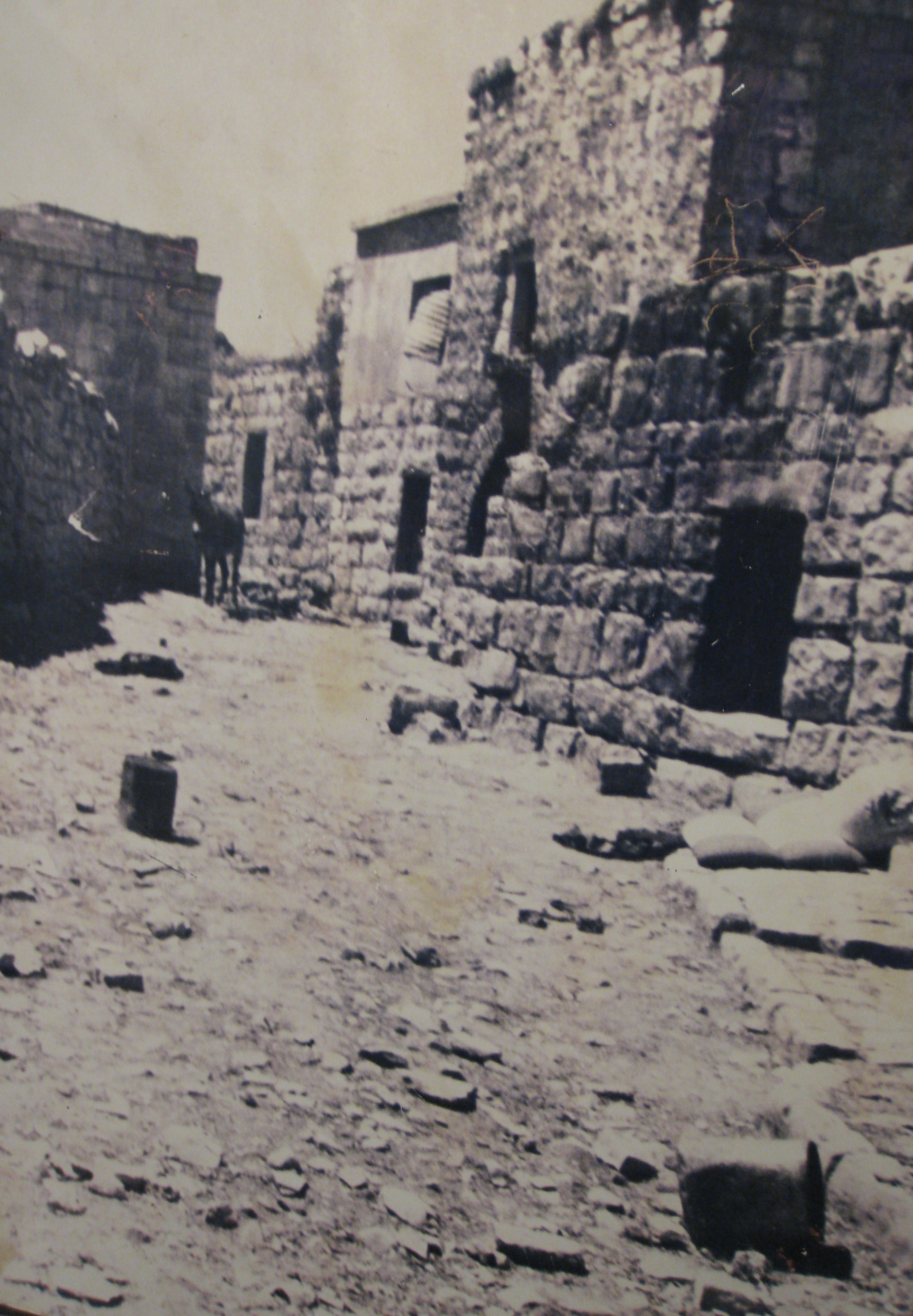 Beit Gidi Exhibits מוצגים בבית גידי - מוזיאון האצל בתש"ח הכפר דיר יאסין